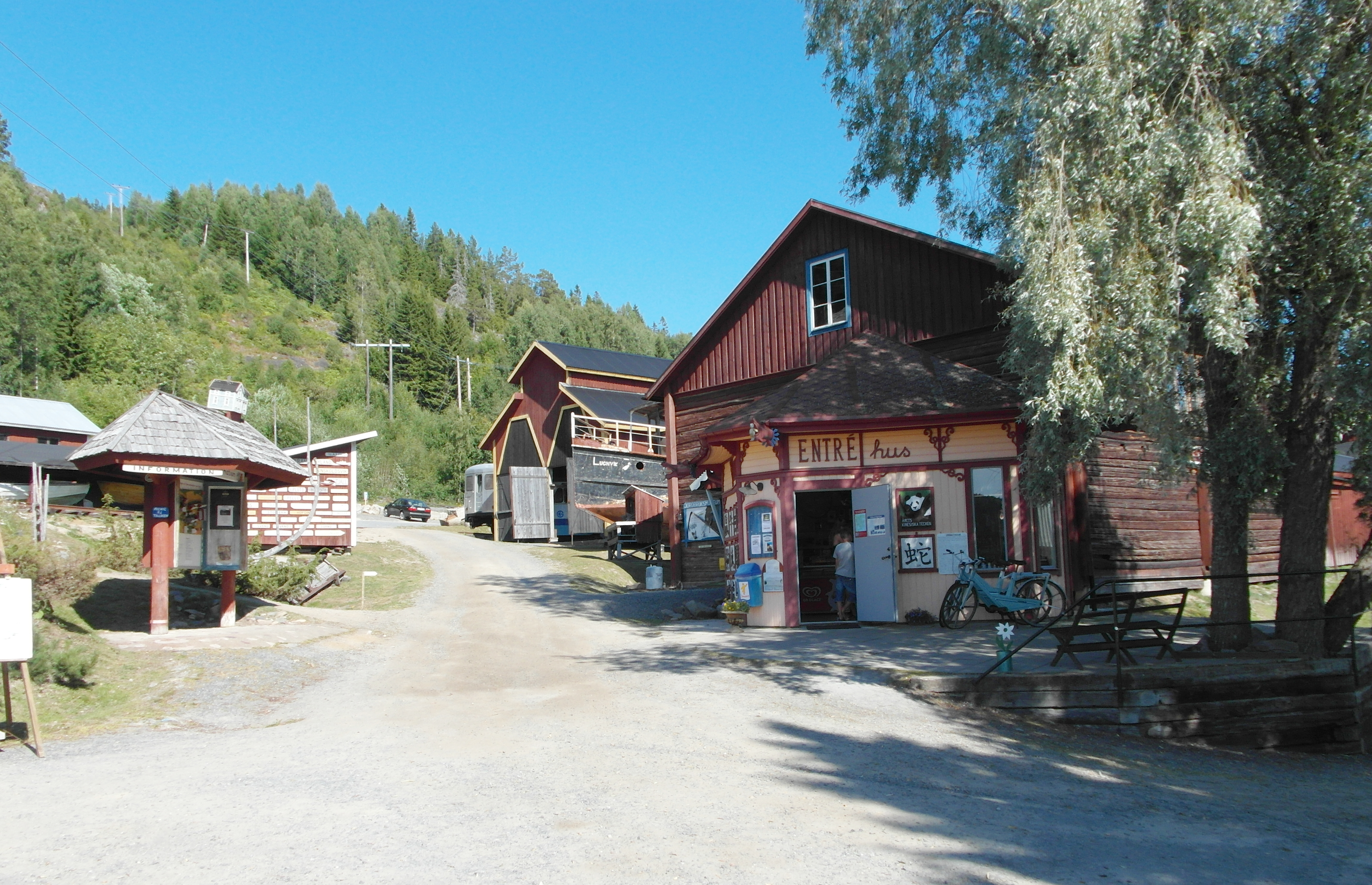 Mannaminne vid Höga kusten. Ett friluftsmuseum skapat av konstnären Anders Åberg